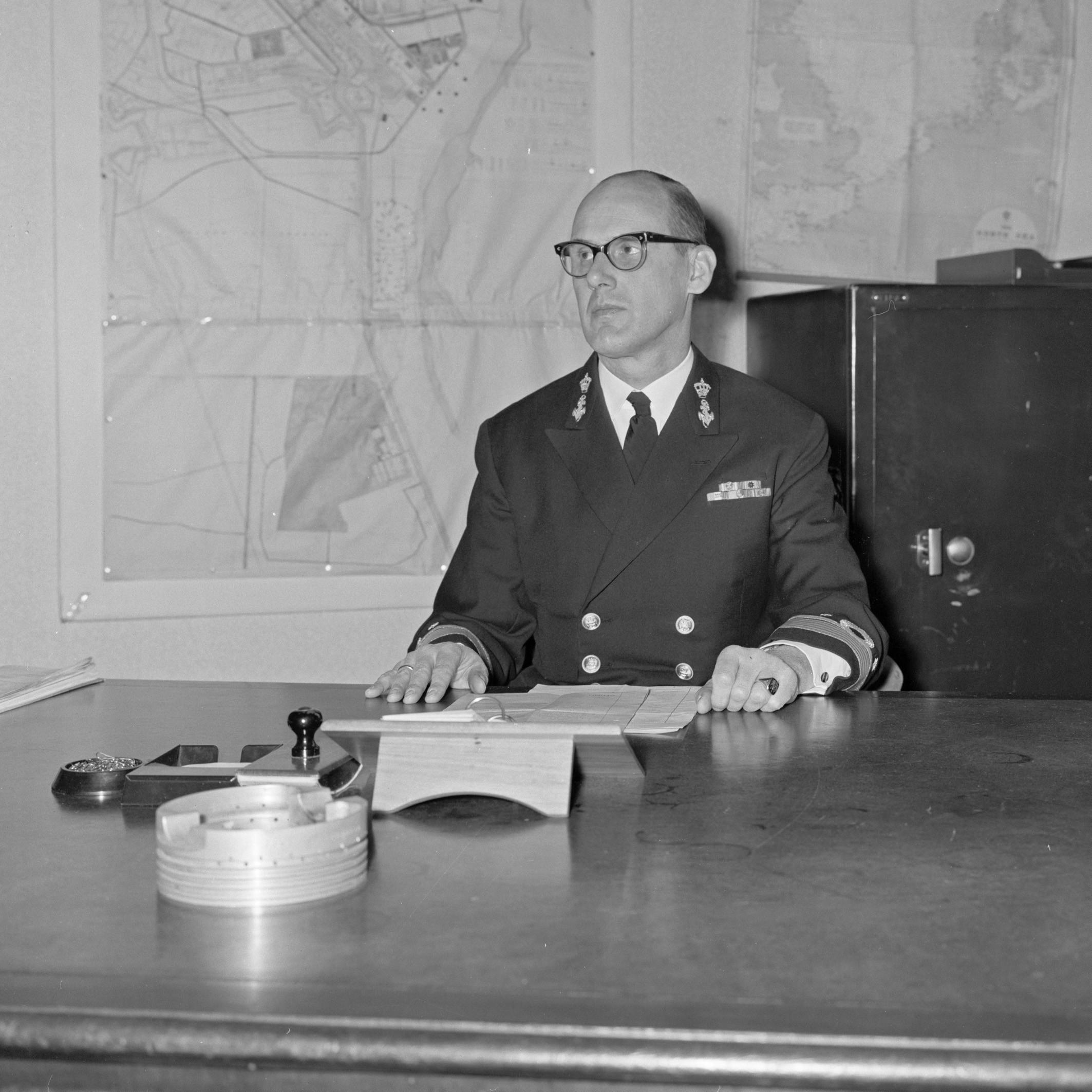 Albert van der Schatte Olivier, viceadmiraal en bevelhebber der Zeestrijdkrachten van 1963 tot 1967.